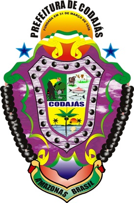 Brasão de Armas do município de Codajás, Amazonas, Brasil.